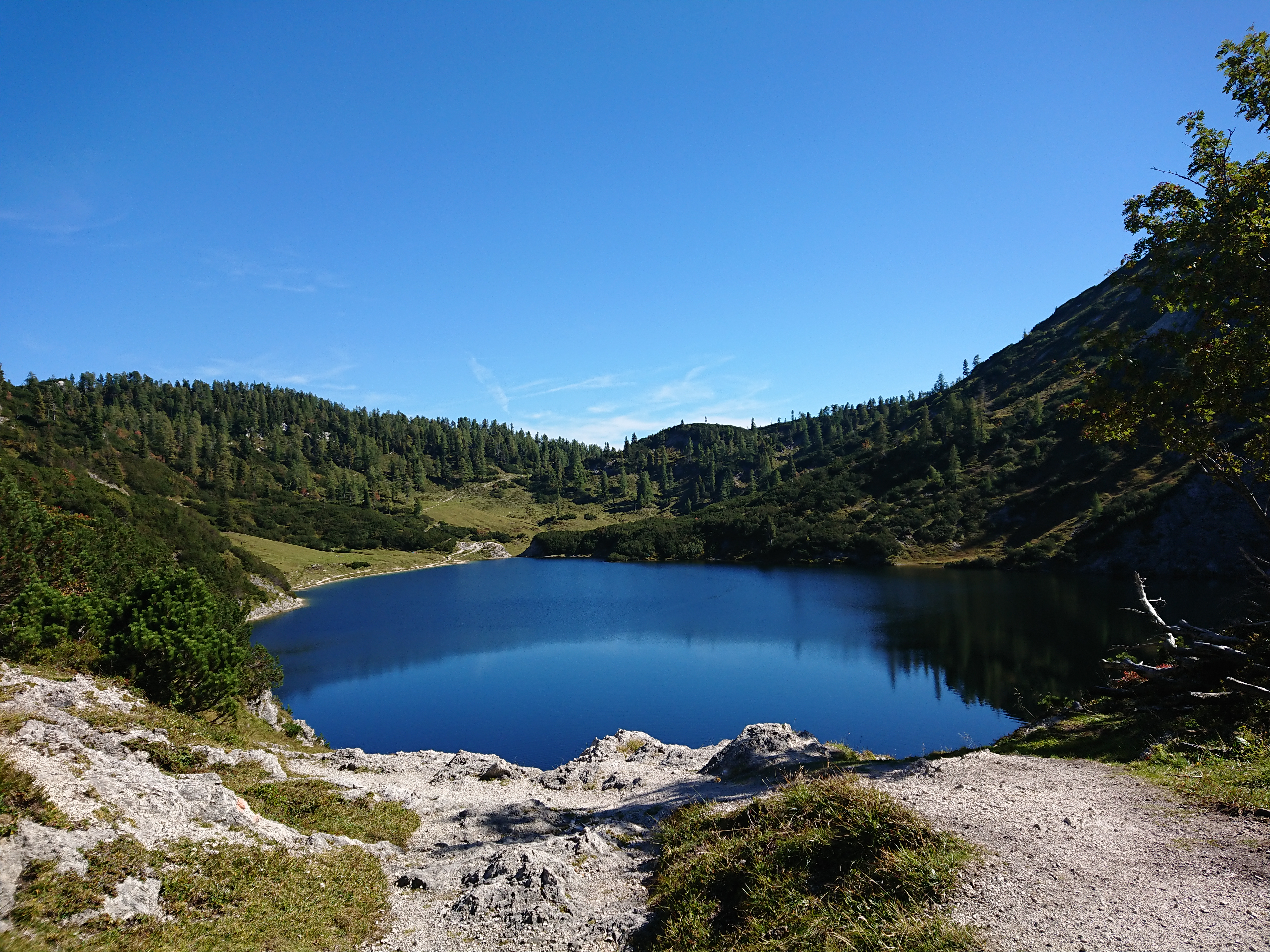 Wildensee